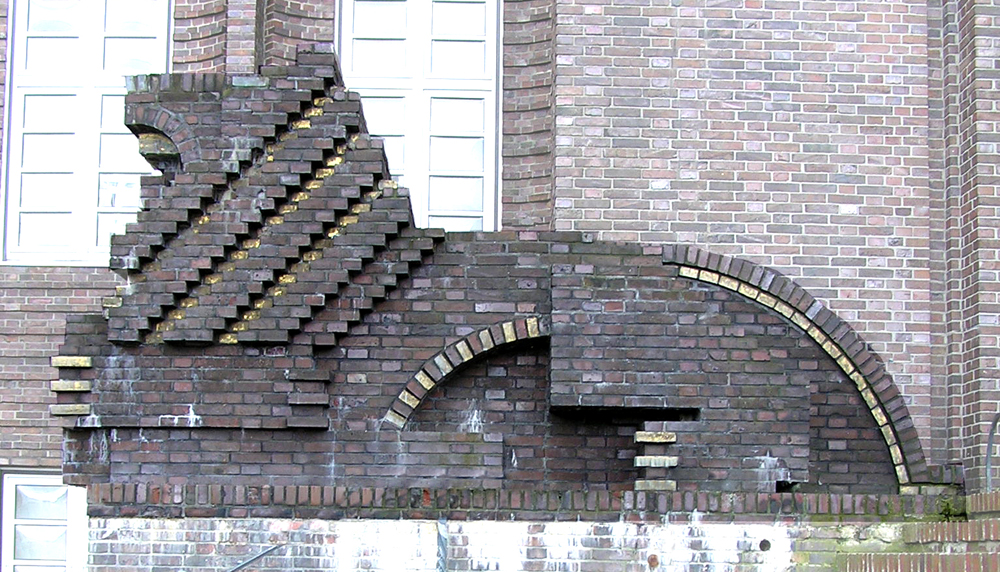 Löwe am Rathaus in Wilhelmshaven (Hans Wagner)